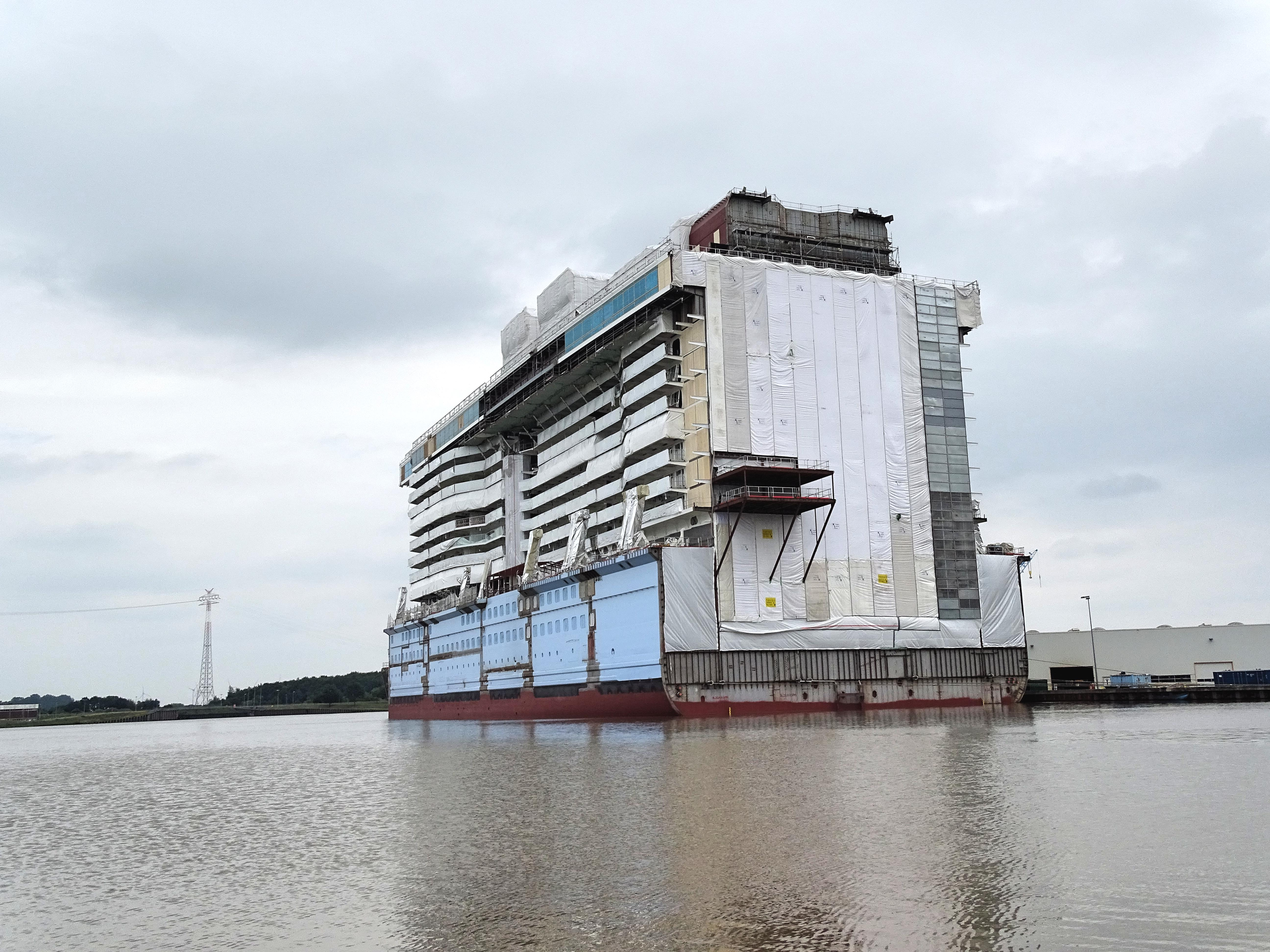 Papenburg, Germany